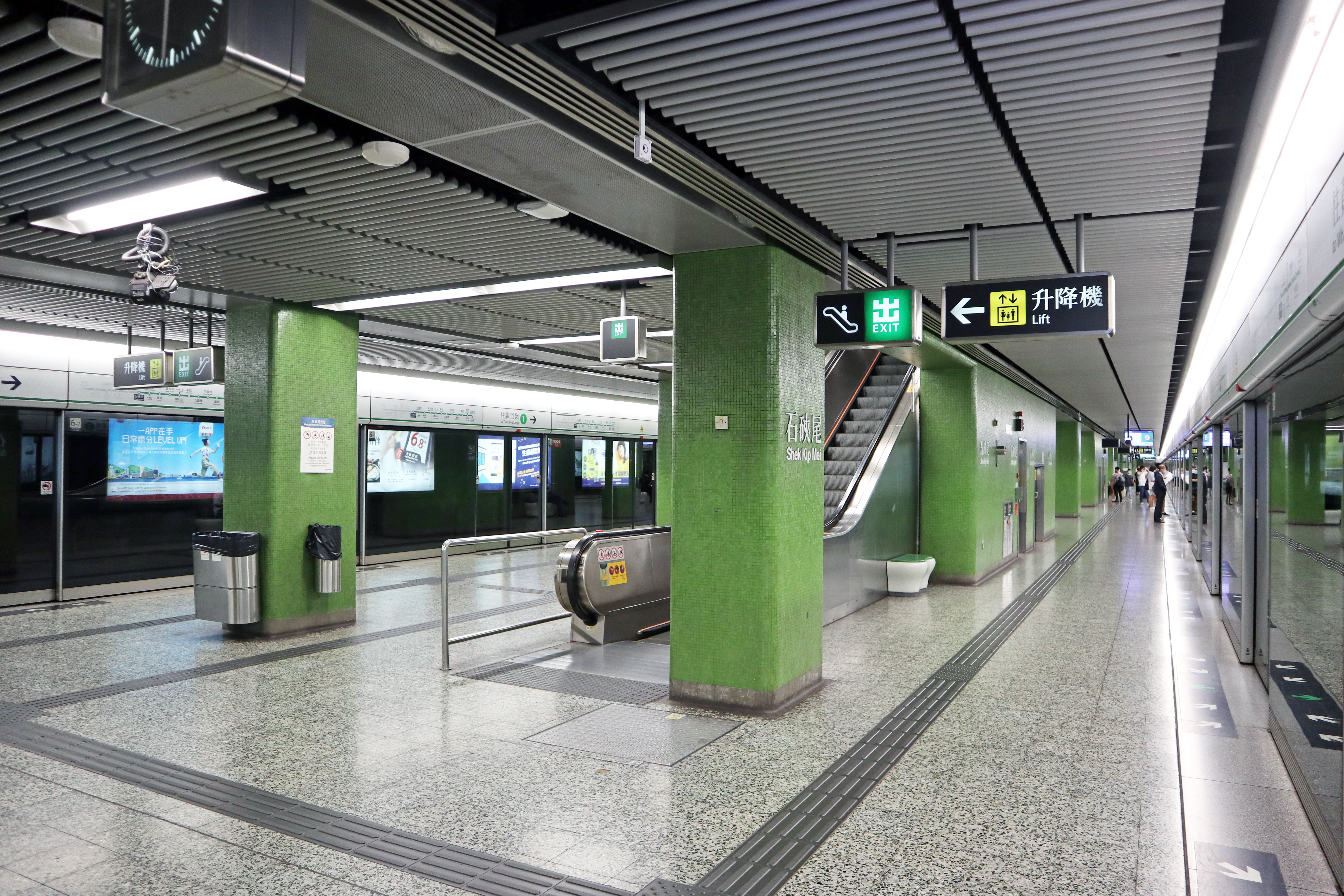 港鐵石硤尾站月台